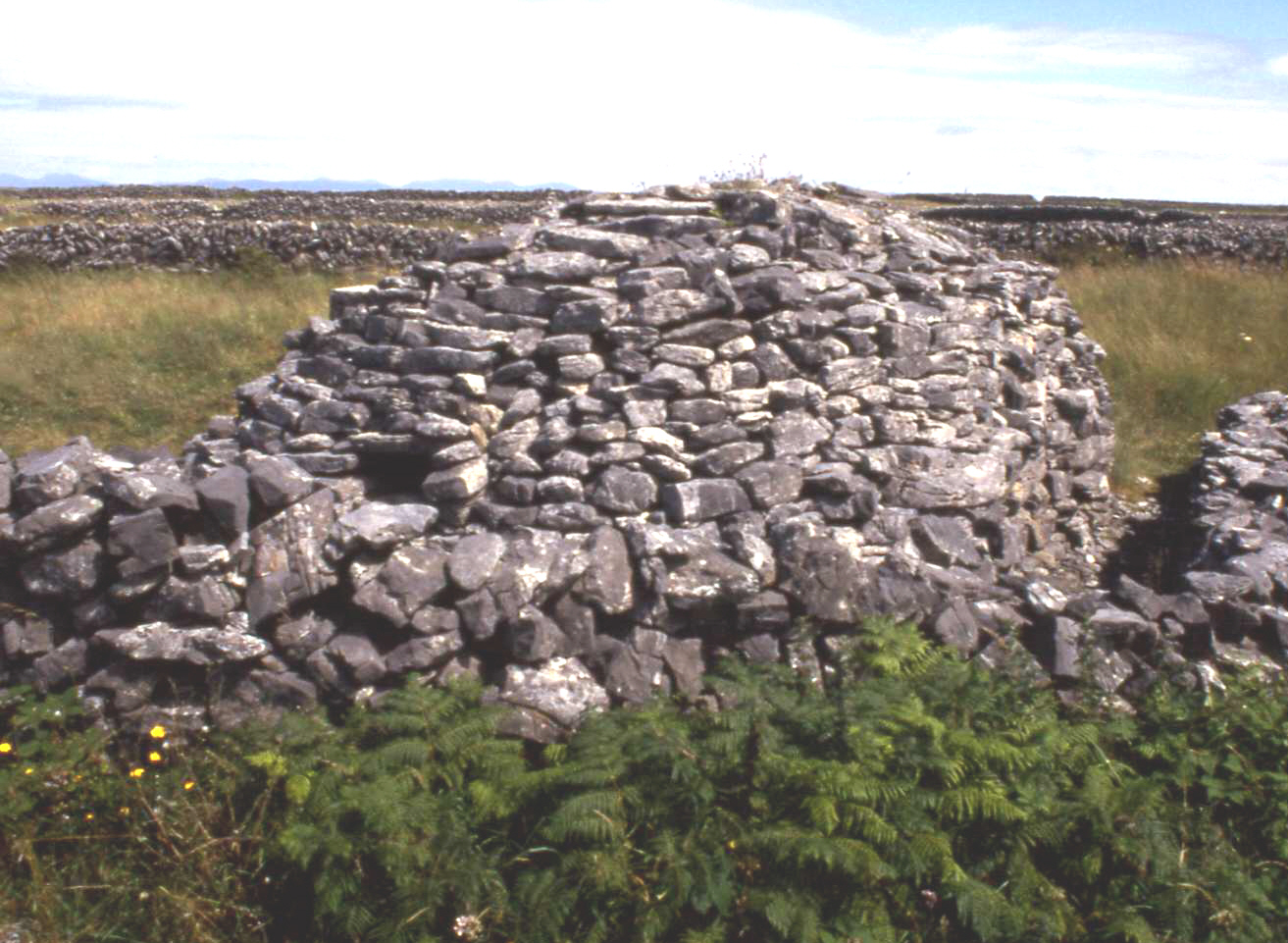 Chlochán